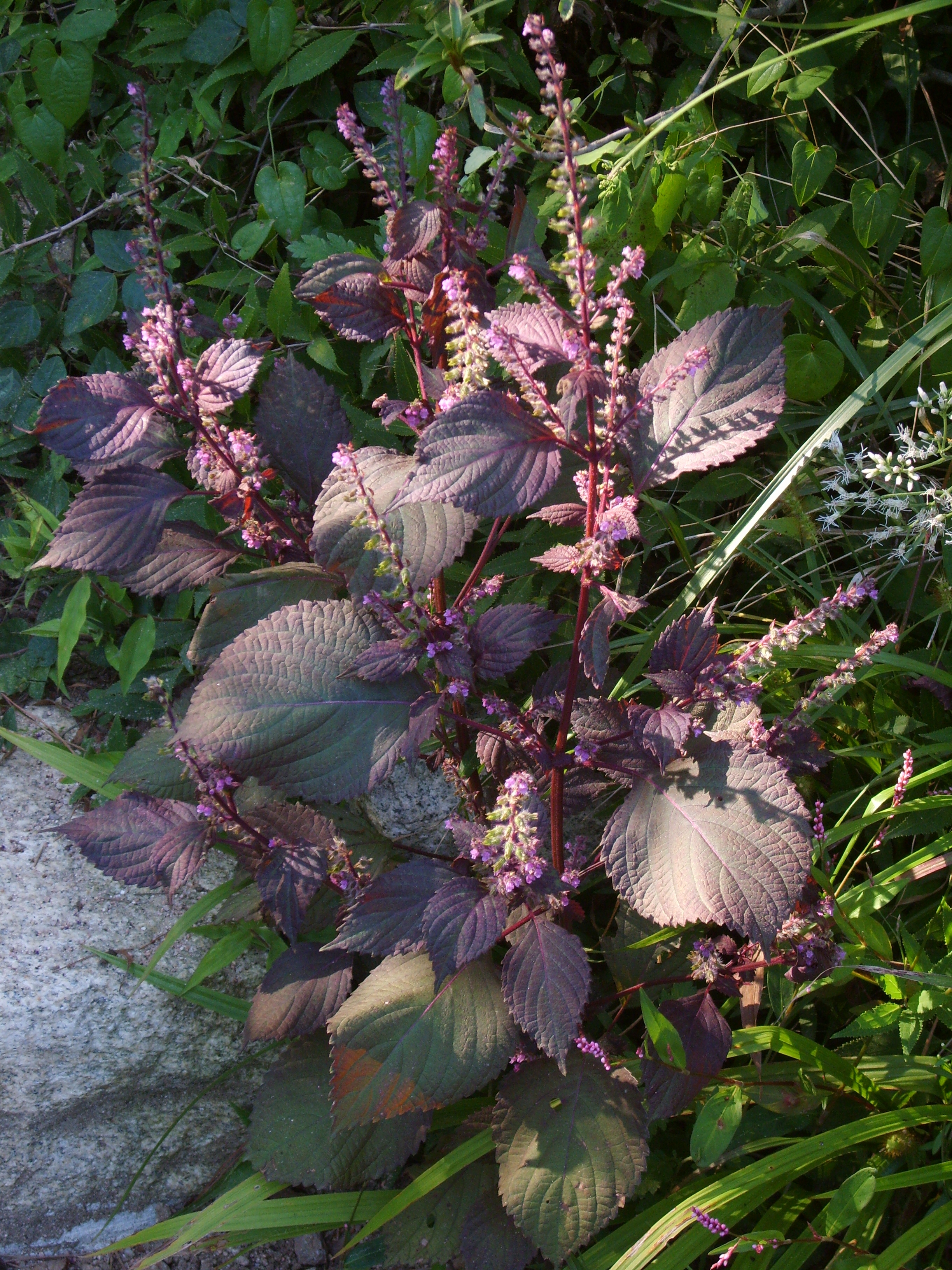 Perilla frutescens var. acuta